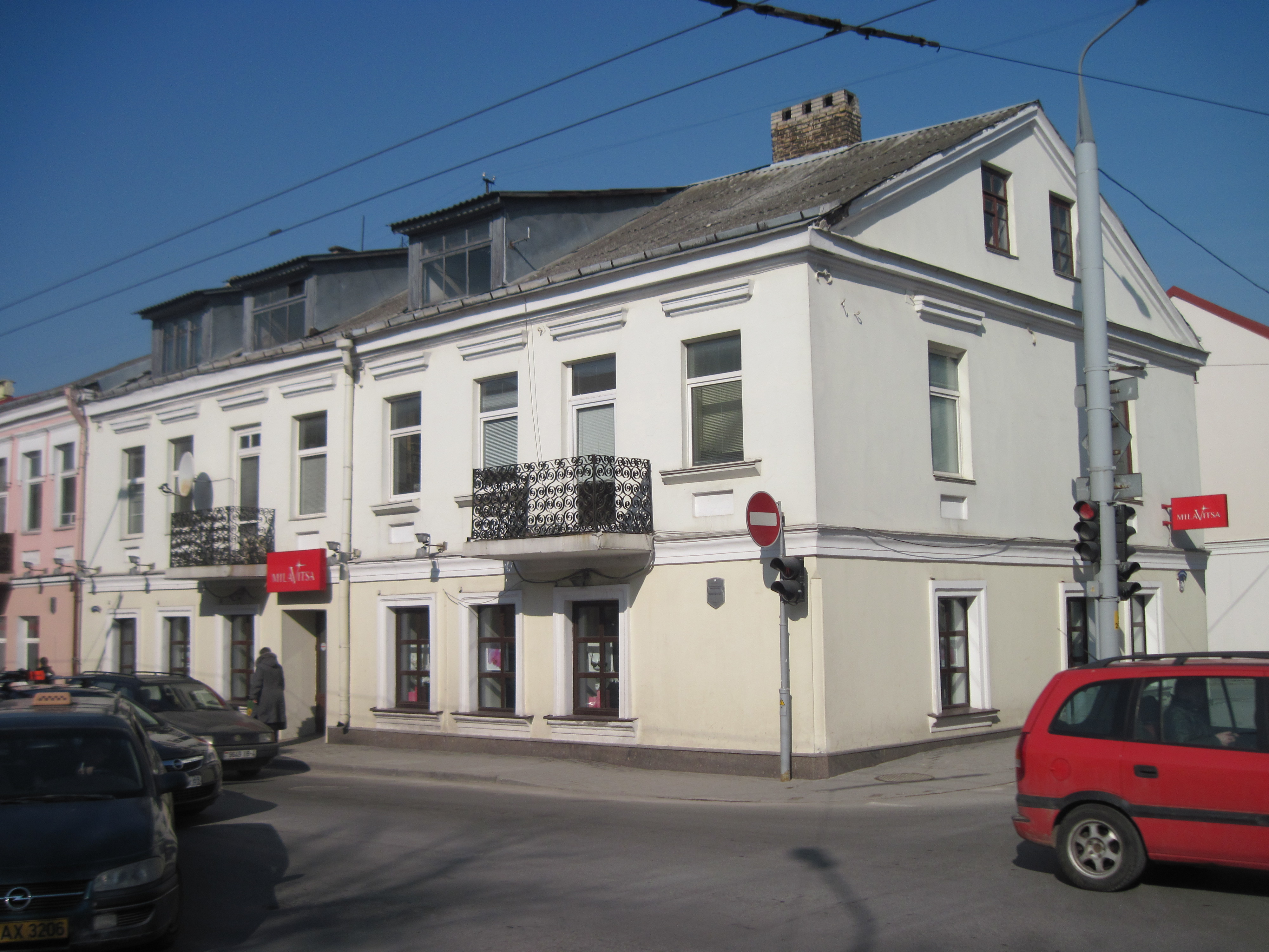 Забудова гістарычнага цэнтра Гродна. Вуліца К. Маркса, 12.